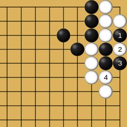 (Séquence B, étape 2) Exemple de course aux libertés au jeu de go : Le tesuji de sacrifice en 1 (horikomi) donne un ko favorable à Noir